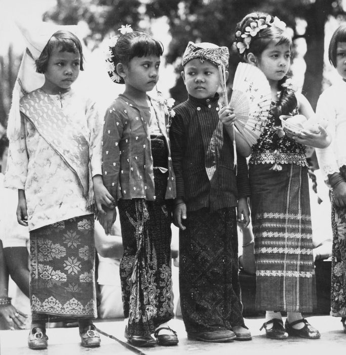 Negatief. Kinderen dragen verschillende traditionele klederdrachten om de eenheid van Indonesië te symboliseren